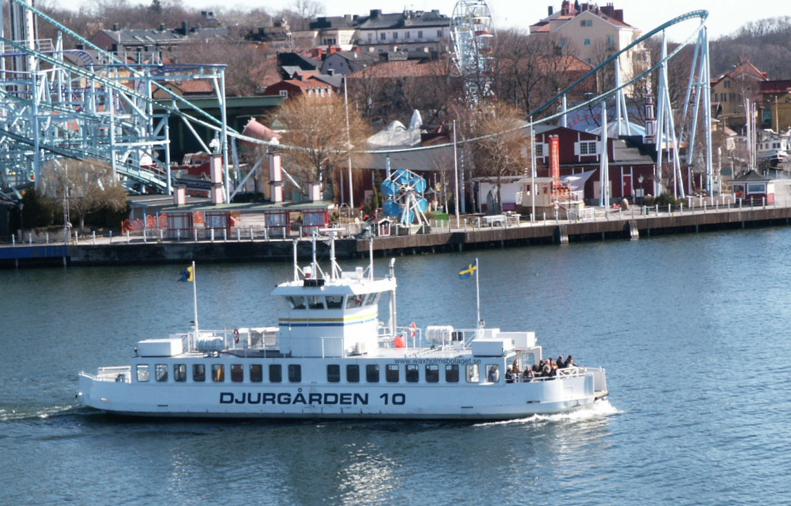 Djurgården 10, Stockholm, Sweden.